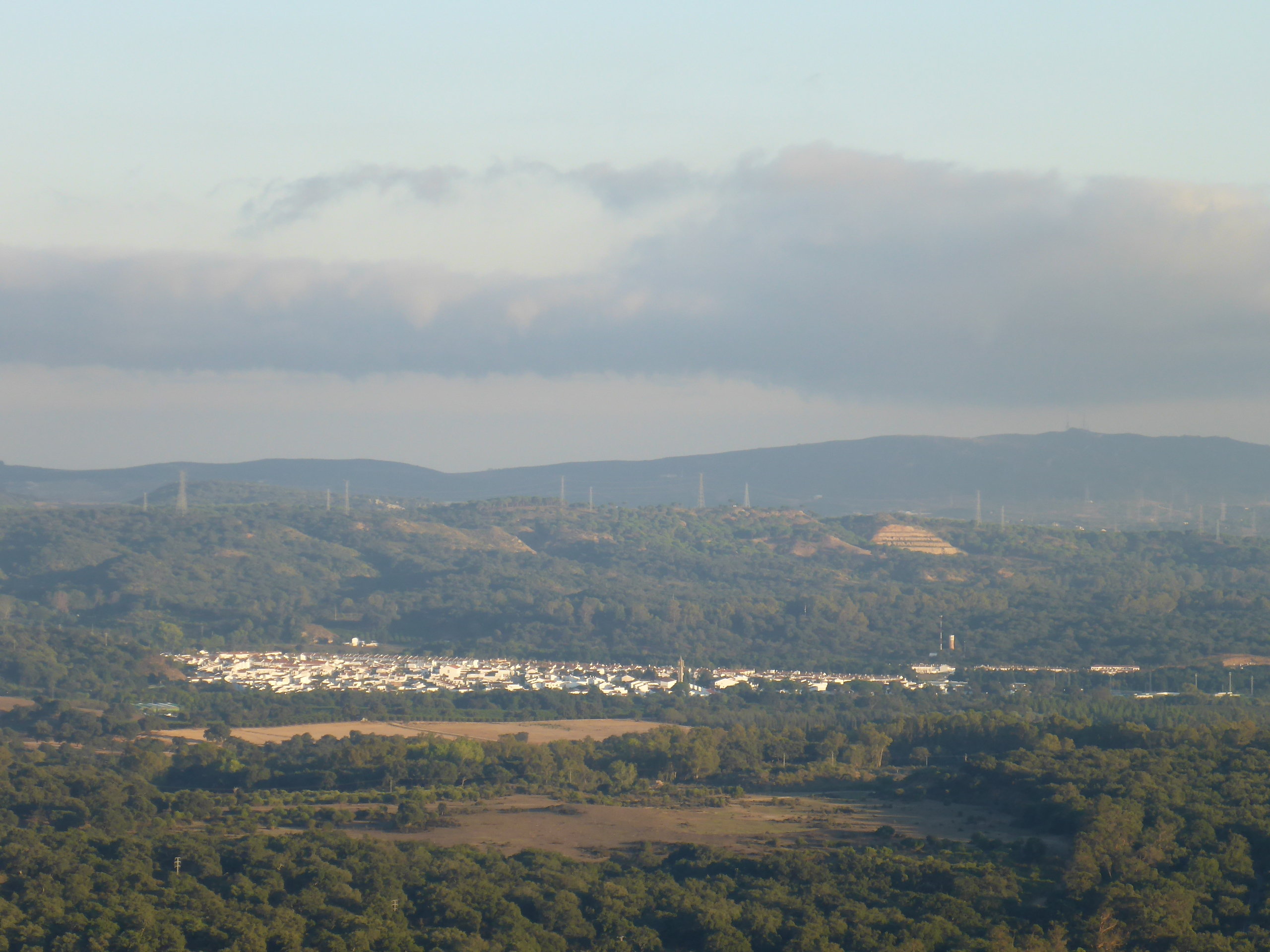 Castellar nuevo (España)